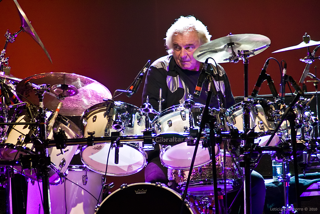 Yes concert at Gran Teatro del Banco Central del Paraguay, Asunción, Paraguay